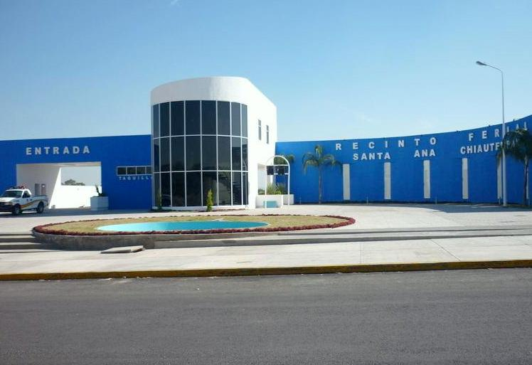 Recinto ferial de Santa Ana Chiautempan